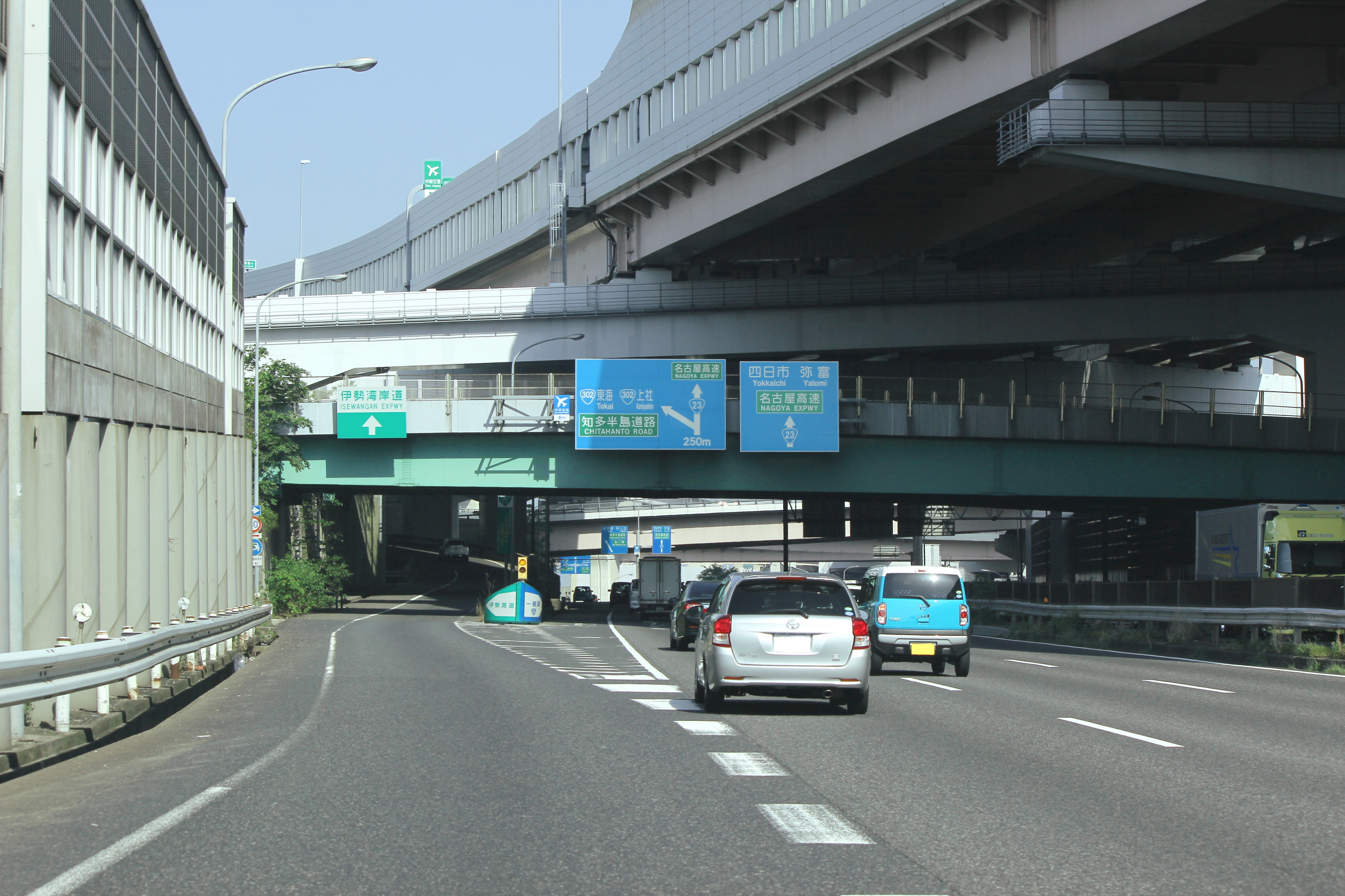 国道23号名四国道における第二東名名古屋南IC入口